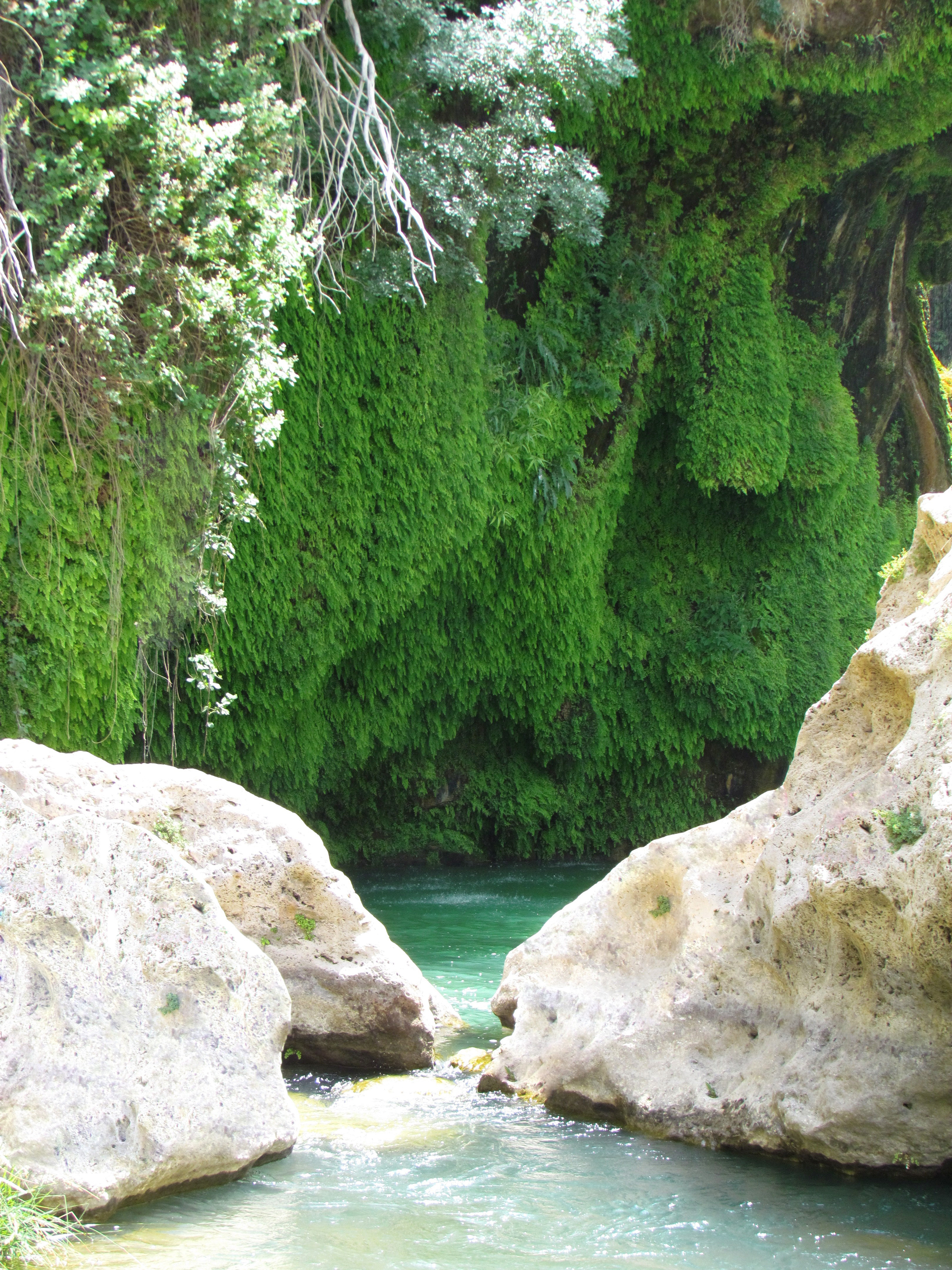 Iran - Pars Province - Sadeh - Tang Boragh